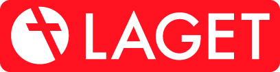 Lagets logo etter siste endring i 2013